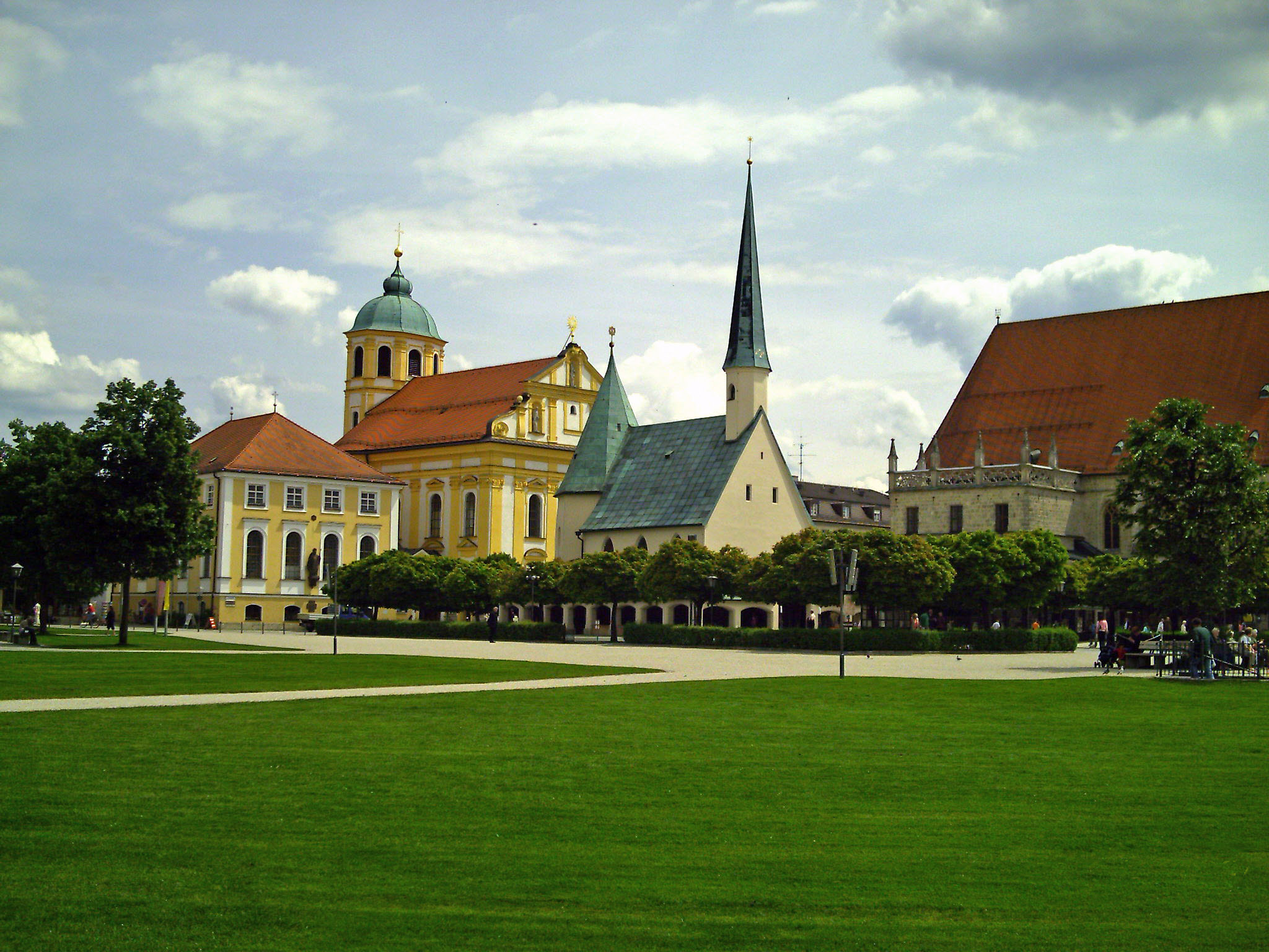 Ensemble mit Gnadekapelle in der Mitte, Altötting, Shrine of Europe, Herz Bayerns, Kapelle geweiht unserer lb. Frau (St. Maria) von Altötting, "Schwarze Madonna" mit über 1 Mio. Pilger pro Jahr.